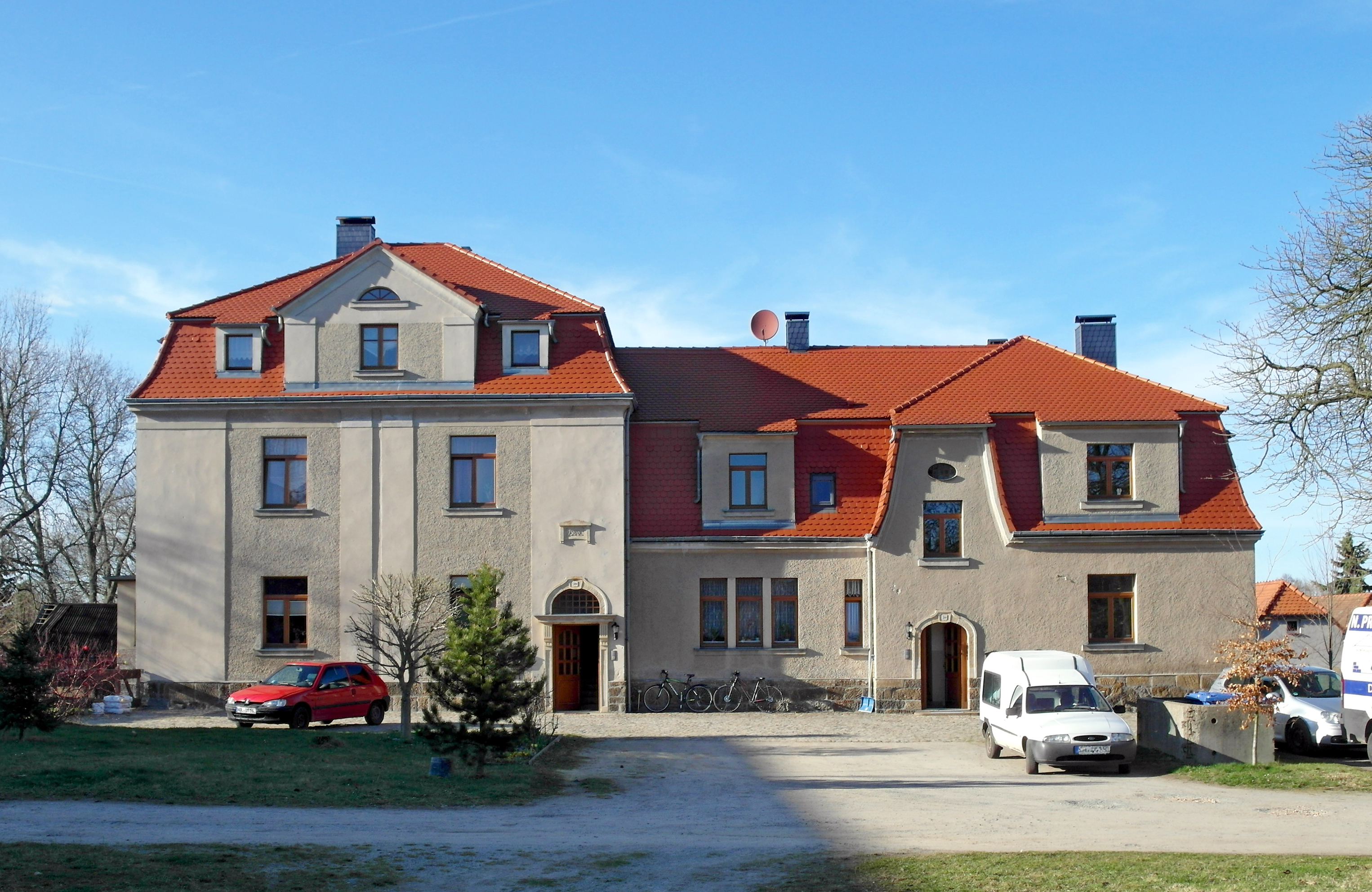 26.03.2017 02689 Sohland/Rotstein, Dorfstraße 289/290: Herrenhaus (1906) im Rittergut Obersohland II. Der sächsische Staat erwarb 1905 das Gehöft und funktionierte es zum Remontegut um. Bis 1945 wurden hier Militärpferde herangezogen. Das Herrenhaus wurde bis 2004 saniert und wird als Wohnhaus genutzt. Hofseite, Sicht von Süden. [SAM8805.JPG]20170326500DR.JPG(c)Blobelt